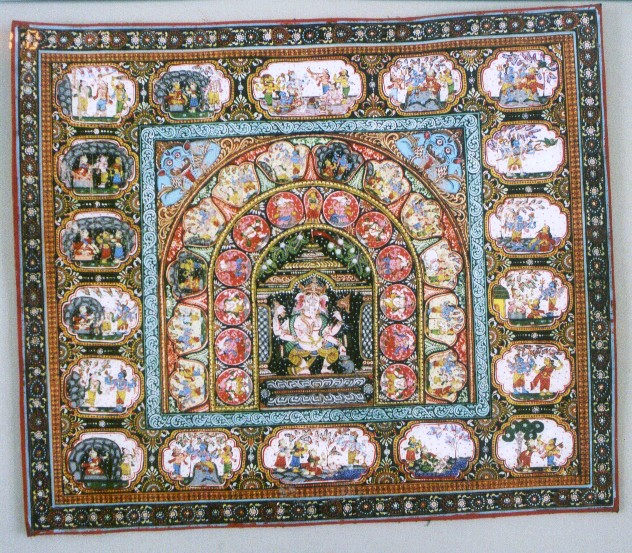 Obraz typu Pattaćitra, przedstawiający tańczącego czterorękiego Ganeśę na lotosowej podstawie pod podwójną półkolistą arkadą, w szerokiej bordiurze ze scenami z życia Śiwy. Ganeśa widoczny en face, w potrójnym przegięciu tribhanga, tańczący na ugiętych nogach, z prawą przednią dłonią uniesioną w geście opieki (abhaja mudra). W trzech pozostałych rękach trzyma bębenek damaru, ankus (ankuśa) i pęta (paśu). Ubrany jest w dhoti i szal, na głowie ma koronę (ardha makuta). Przy jego lewej stopie siedzi na tylnych łapkach szczur, wierzchowiec (wahana) Ganeśi. Obraz, wykonany w stylu charakterystycznym dla malarstwa z Orissy (Pattaćitra).